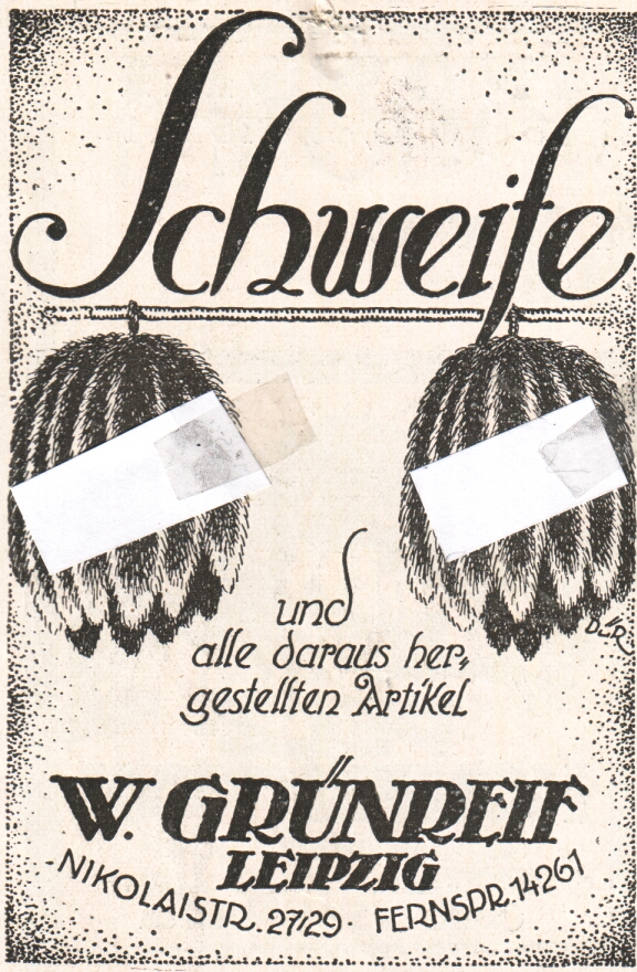 Anzeige des Fellschweif-Großhändlers W. Grünreif, Nikolaistr. 27/29, Leipzig Schweife und alle daraus hergestellten Artikel aus Der Rauchwarenmarkt, Berlin, 1922, Seite 36 (Zeichnungen mit Fellschweifen beim Scannen abgedeckt)